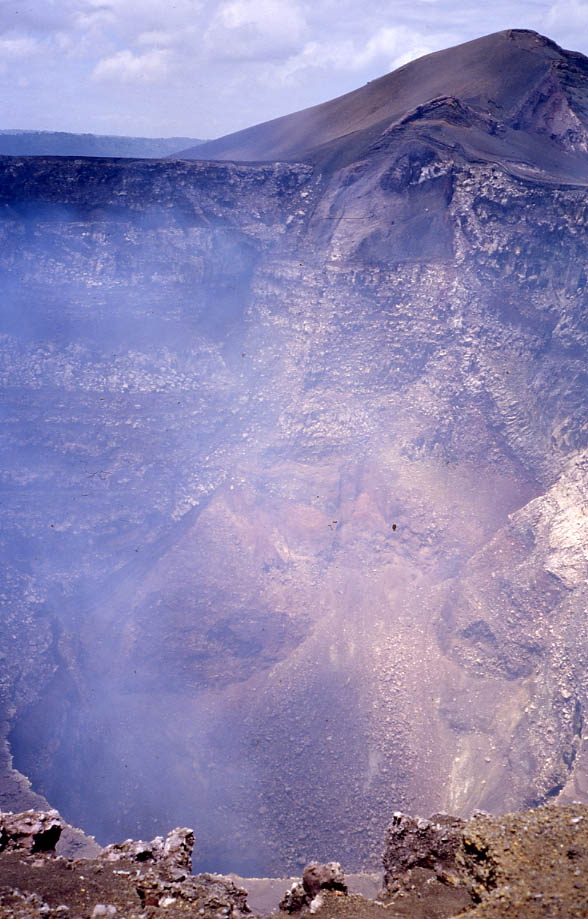 Cráter del Volcán Masaya. Nicaragua. 2002